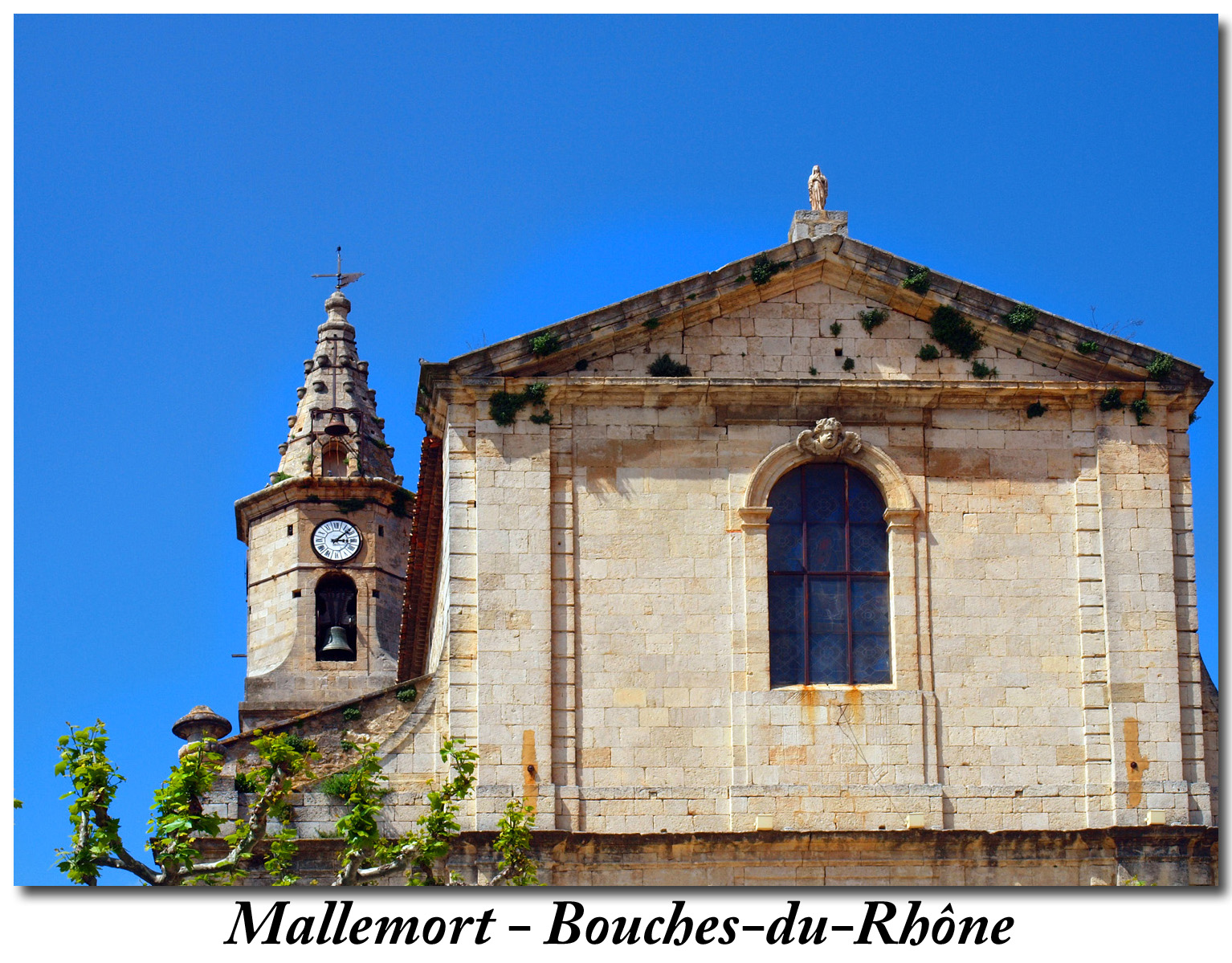 partie est